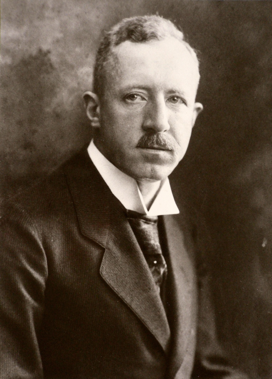 Porträtfotografie von Carl Meinecke (1873–1949)